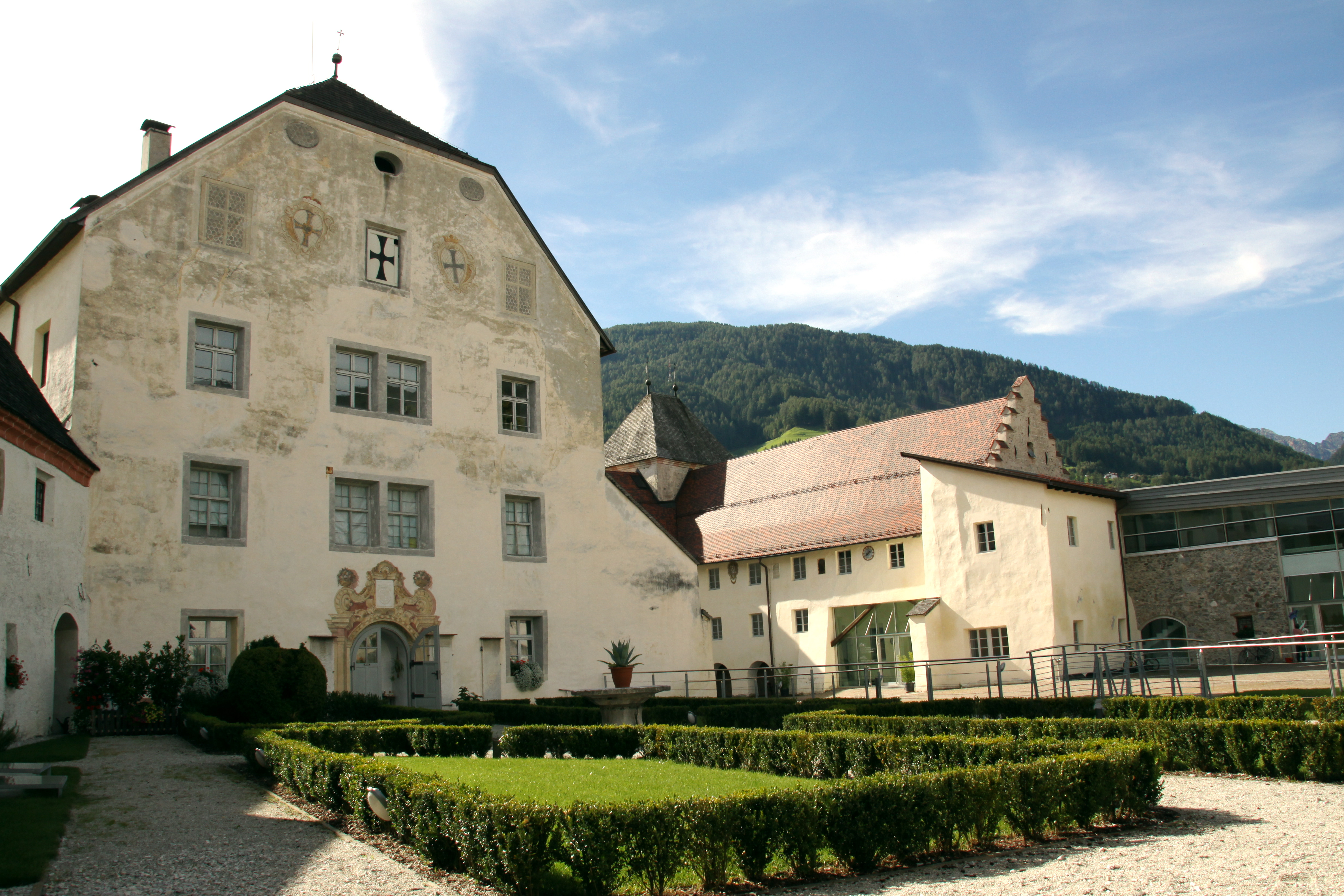 Innenhof der Kommende Sterzing- heute Museum und Musikschule